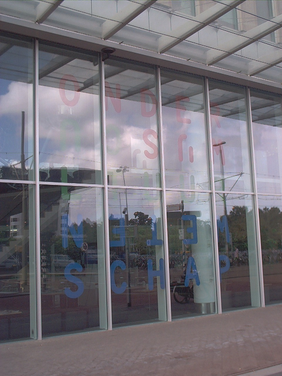 Dubbele licentie Eigen werk Foto gemaakt door Dedalus 13 september 2005 Ministerie van Onderwijs Cultuur en Wetenschappen